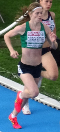 Młodzieżowe Mistrzostwa Europy w Lekkoatletyce U23 w Bydgoszczy 13-16 lipca 2017, finał biegu na 800 m kobiet